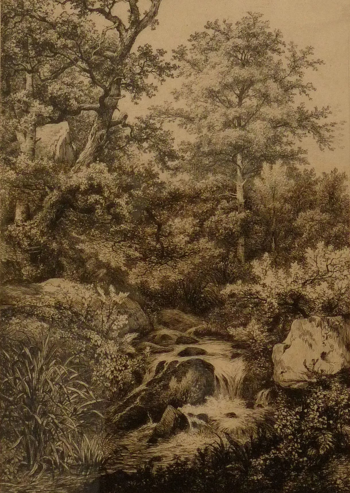 Ruisseau, d'Eugène Stanislas Alexandre Bléry (1805-1886), eau-forte, 1866, Cabinet des estampes et des dessins de Strasbourg.